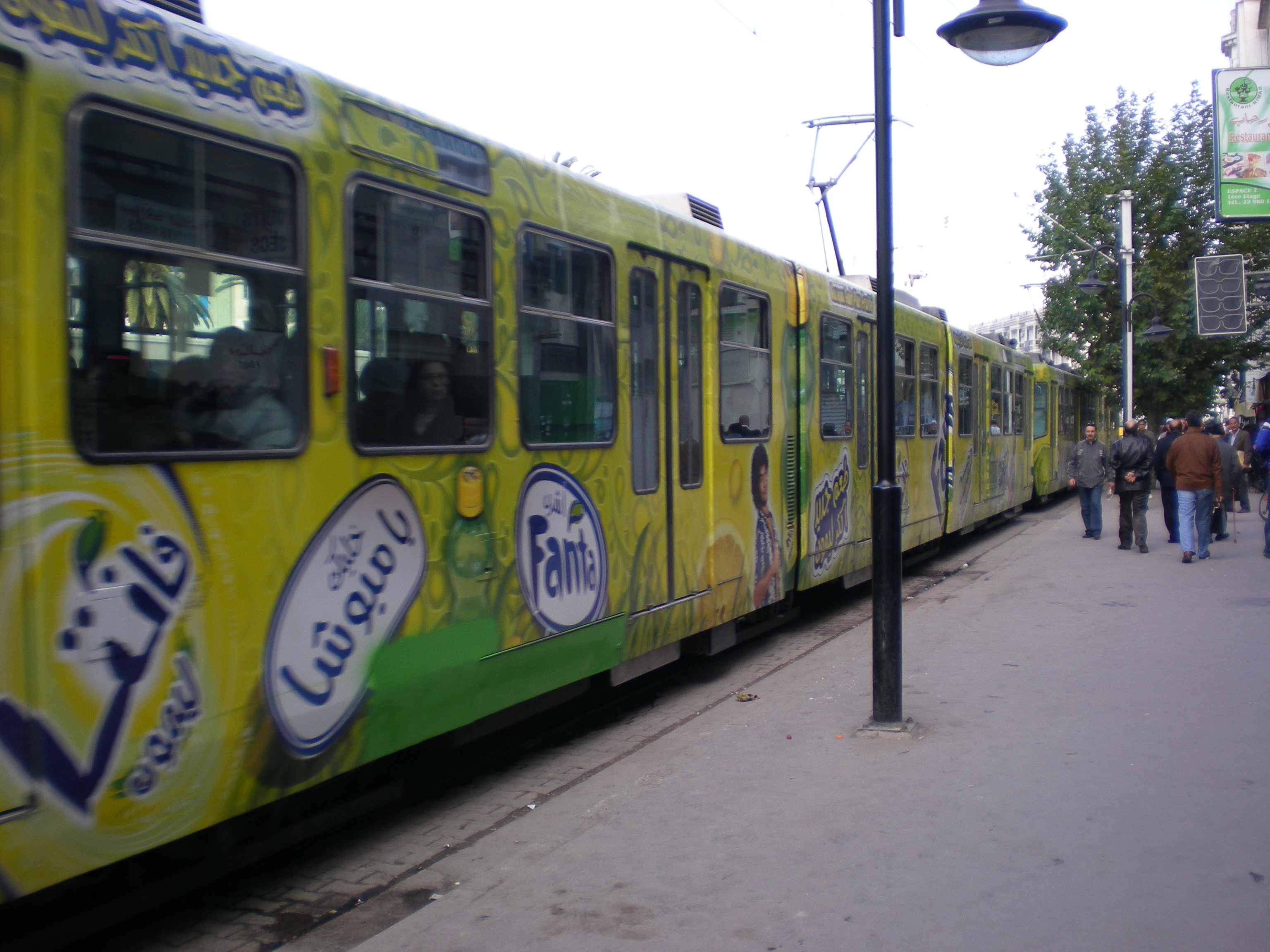 Metro leger à Tunis